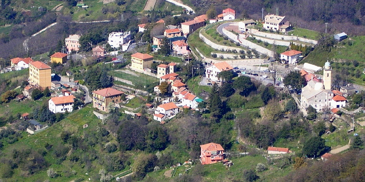 Veduta di Geminiano (Bolzaneto - Genova)